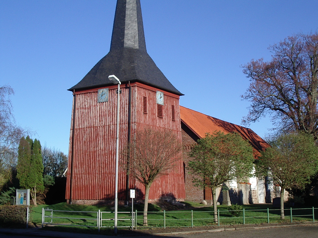 Photo taken by User:Geoz Summer 2005 Kirche St. Wilhadi in Ihlienworth